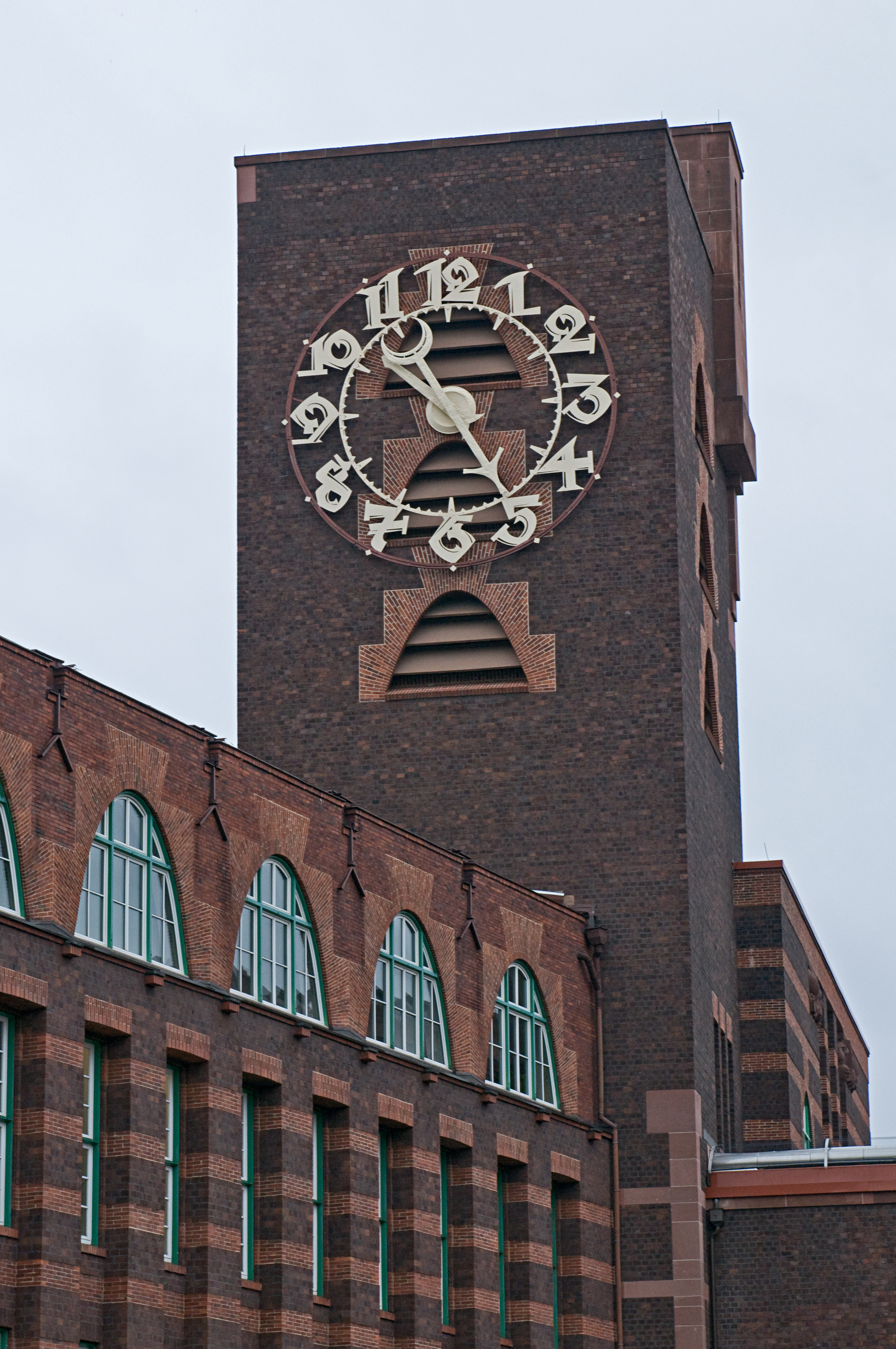 Industriepark Höchst: Turm und Uhr am Peter-Behrens-Bau